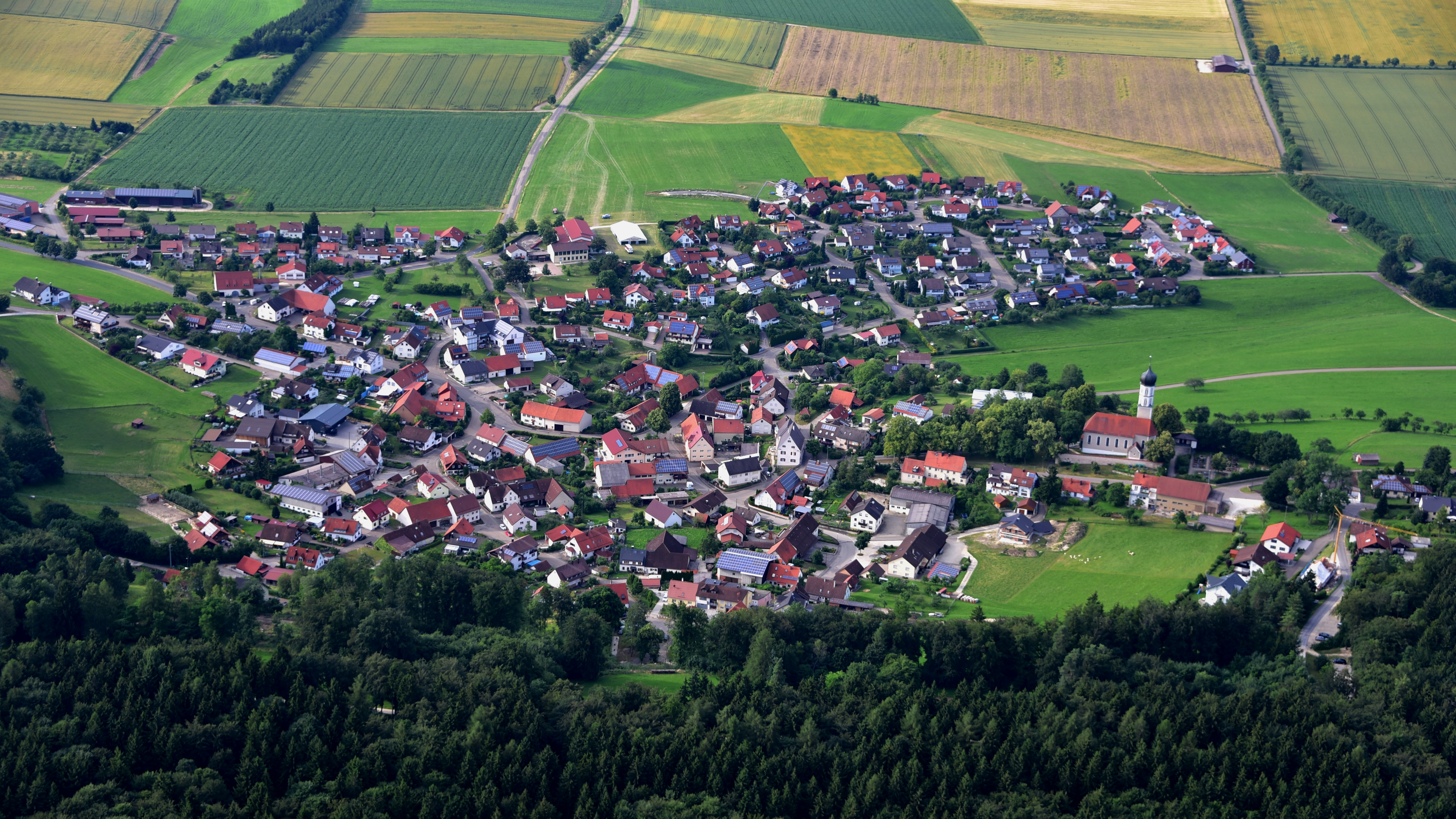 Auernheim (Nattheim), Luftaufnahme (2016)